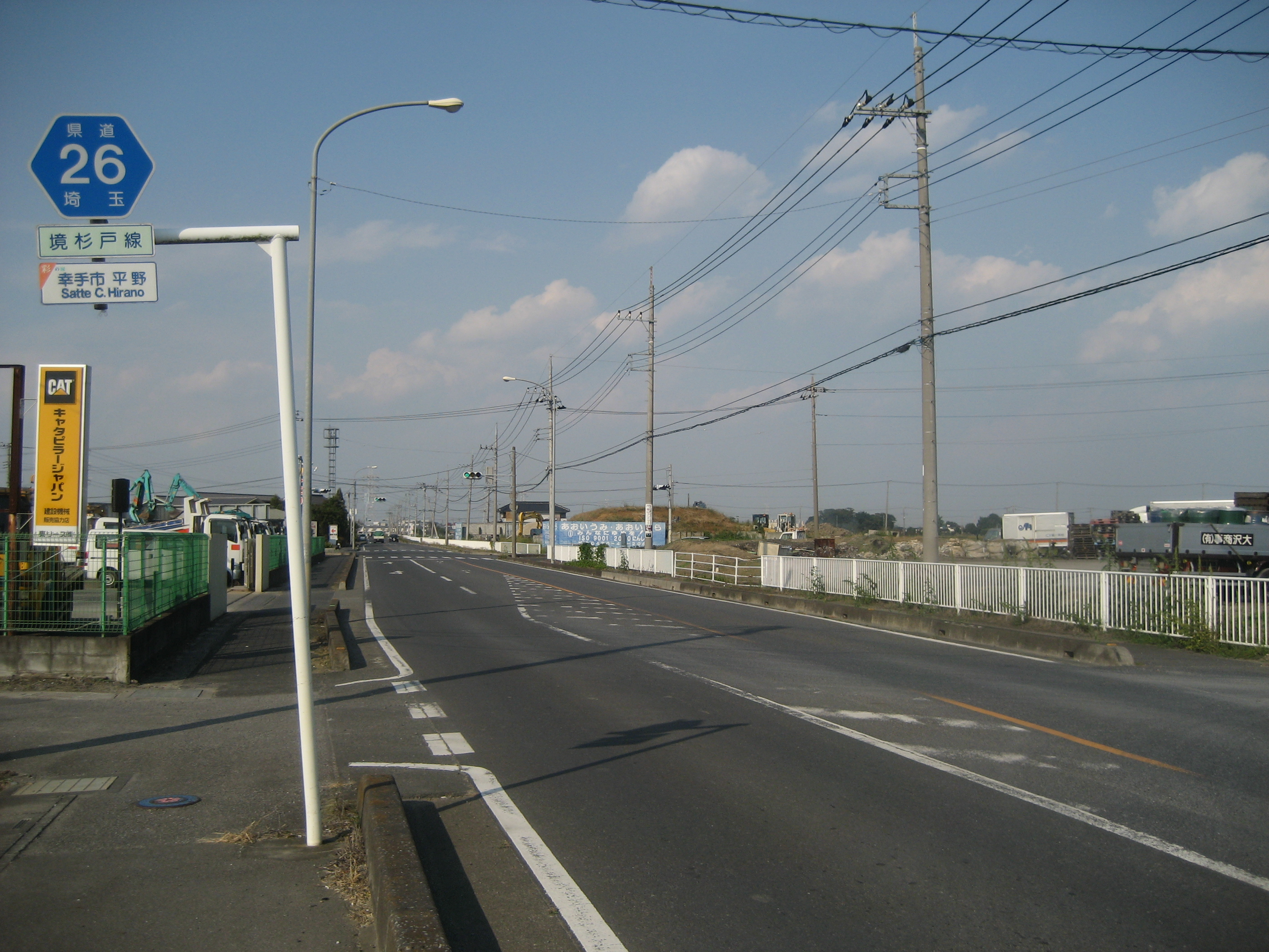 埼玉県道26号線幸手市平野付近（境方面を撮影）